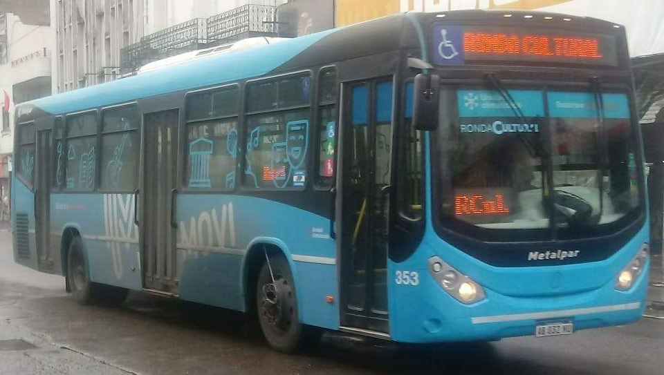 Interno 353 de la empresa Movi, quien brinda servicio de la Línea Ronda Cultural